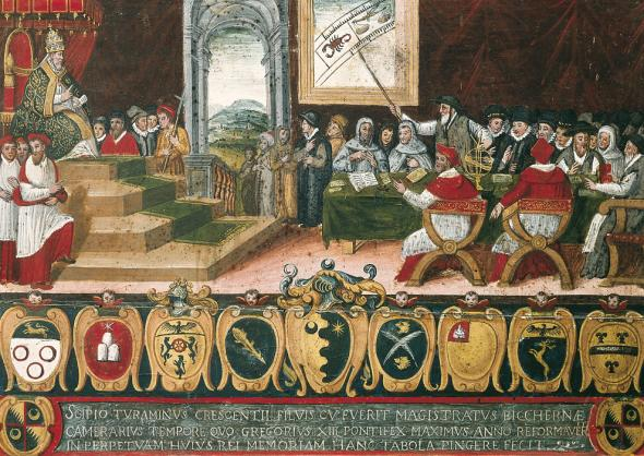 scipio turaminus crescentii filuis cu fuerit magistratus bicchernae camerarius tempore quo gregorius pontifex maximus anno reformaver in perpetuam hulus rei memoriam hanc tabola pingere fecit